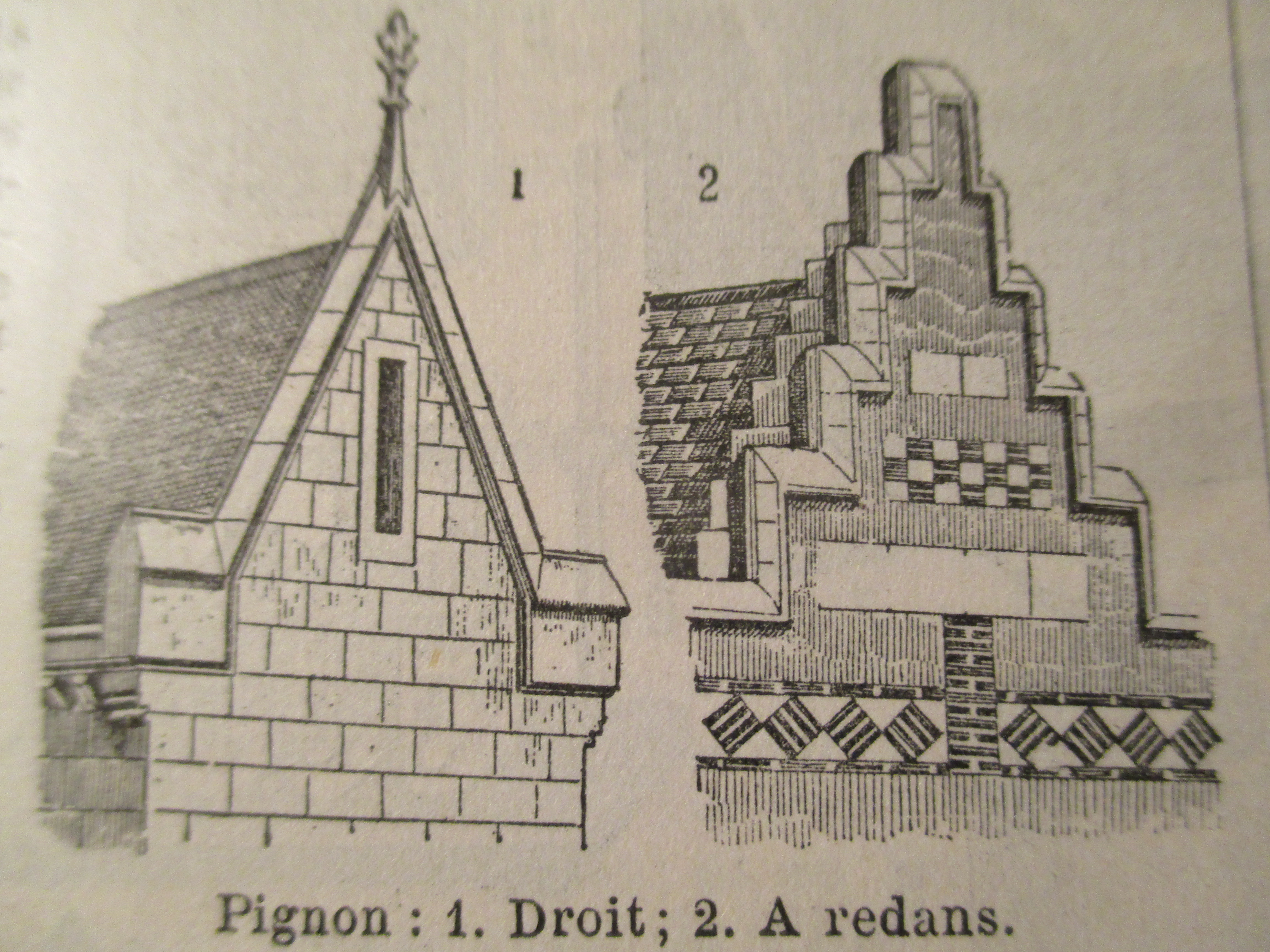 Pignons, in Larousse encyclopédique illustré (1900)